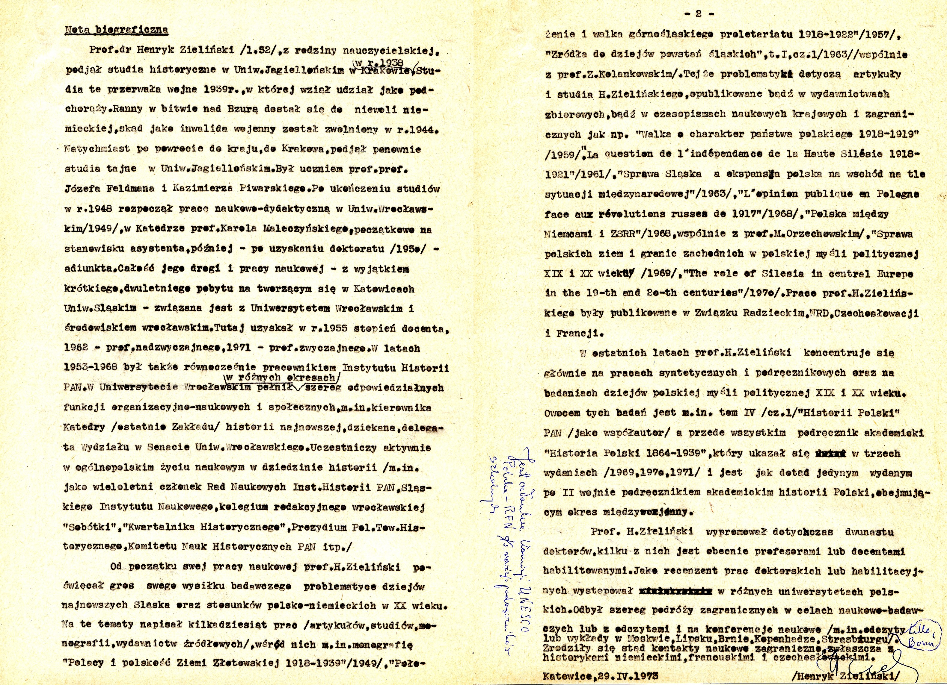 Dokument, opisujący karierę naukową prof. Henryka Zielińskiego do roku 1973. Sporządzony osobiście i własnoręcznie przezeń podpisany w 1973 roku.